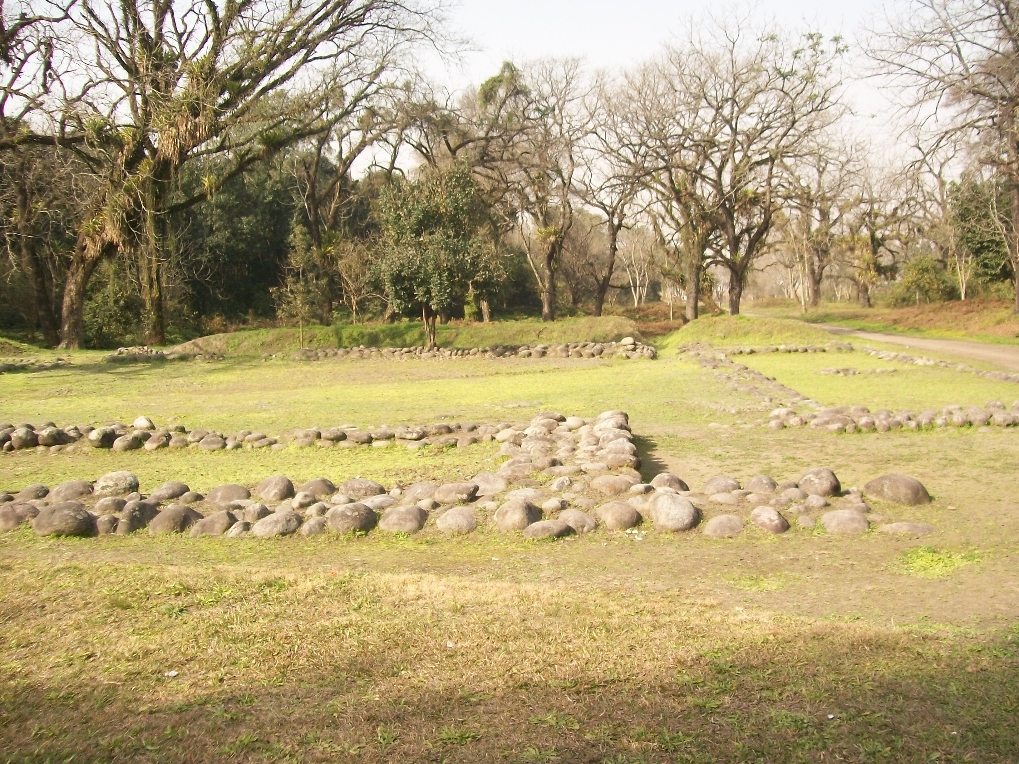 Base y cimientos de las paredes del cabildo, su patio central redeado de ocho dependencias, Ruinas de Ibatín, antigua ubicación de la ciudad de Tucumán, Argentina.